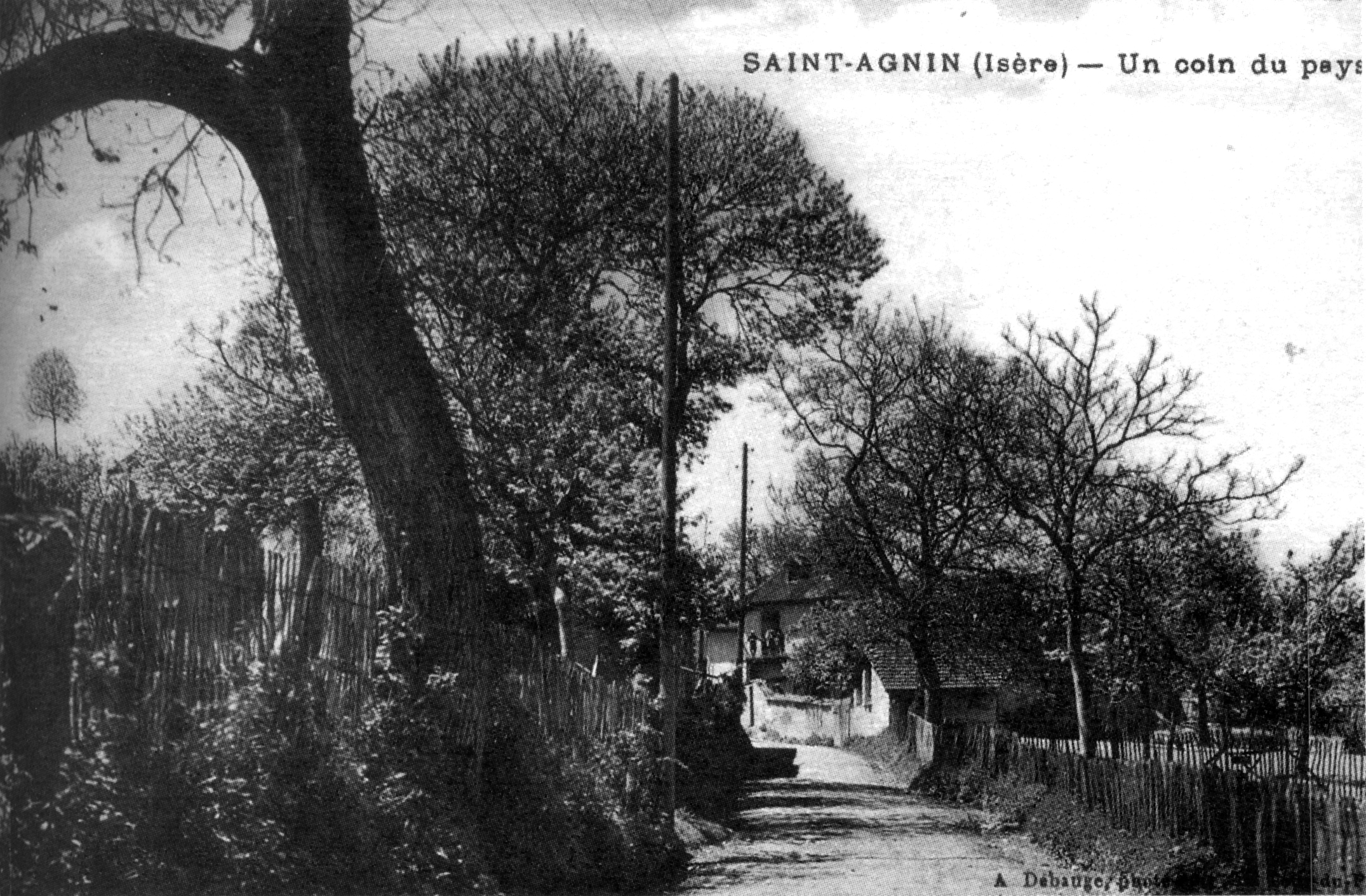 Saint-Agnin-sur-Bion, un coin du pays en 1912